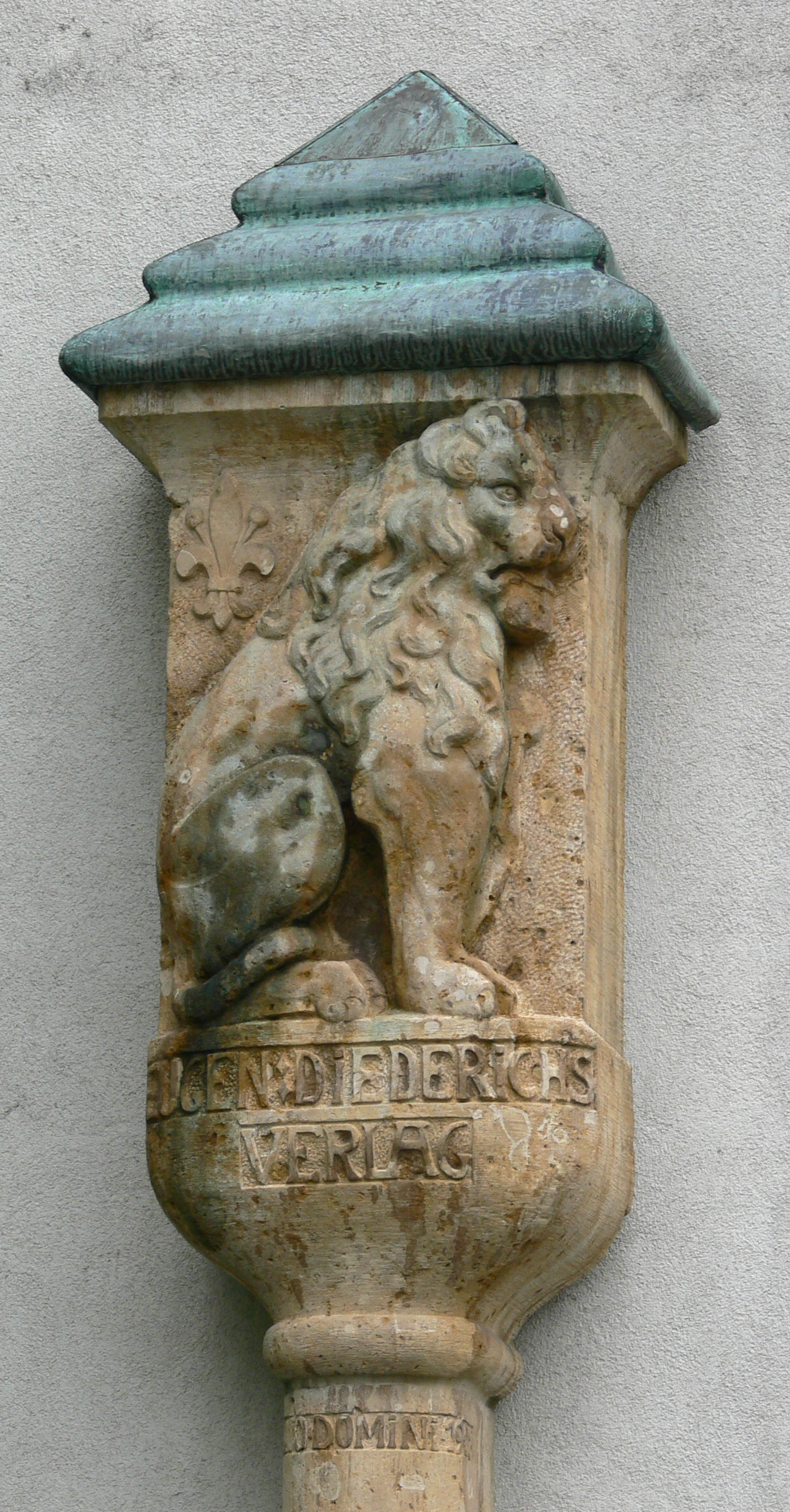 Jena, Carl-Zeiss-Platz, Relief von Ernst Neumeister mit dem Logo des Eugen Diederichs Verlags, ursprünglich am 1945 zerstörten Verlagshaus angebracht